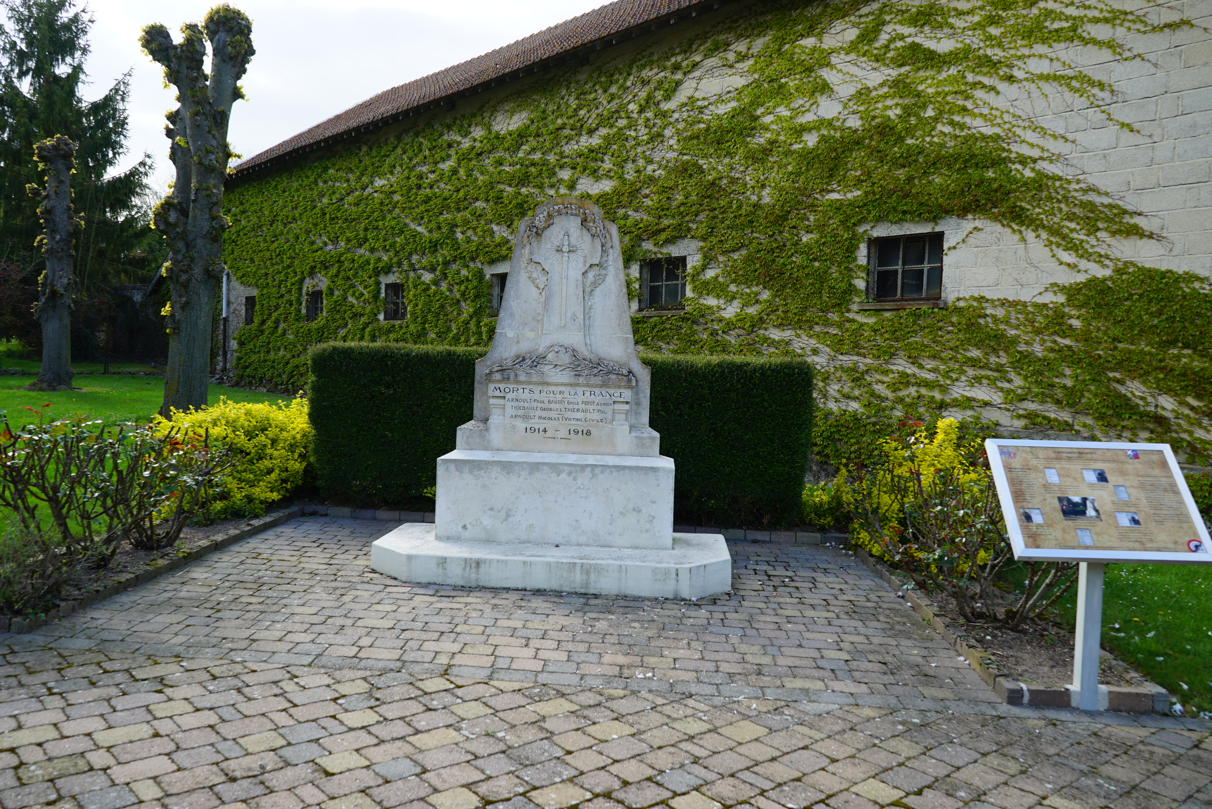 lors du "Centenaire de la bataille des monts de champagne".